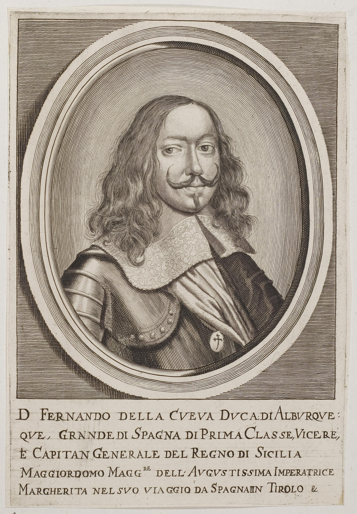 Grafik aus dem Klebeband Nr. 2 der Fürstlich Waldeckschen Hofbibliothek Arolsen Motiv: Francisco Fernández de la Cueva, 8th Duke of Alburquerque (1619–1676)